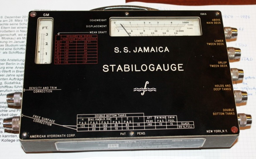 Stabilitätsrechner Stabilo